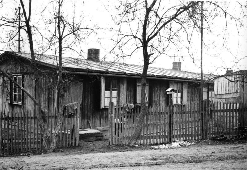 Niederseelbach/Taunus Barackenunterkunft